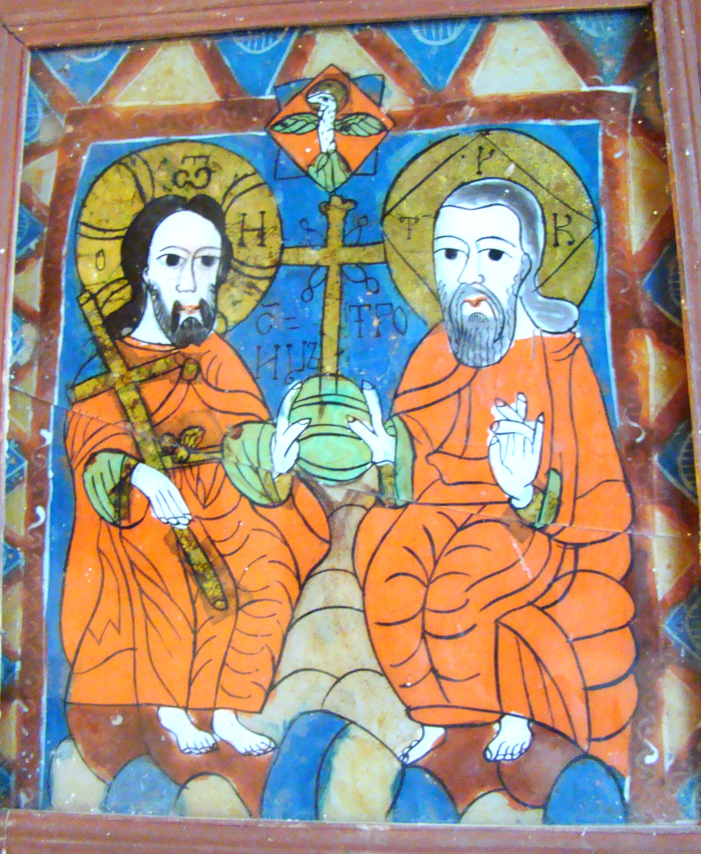 Icoană colecția parohiei Boiereni, județul Maramureș